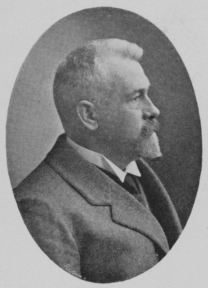 Ludvík Wurzel (1865-1913)